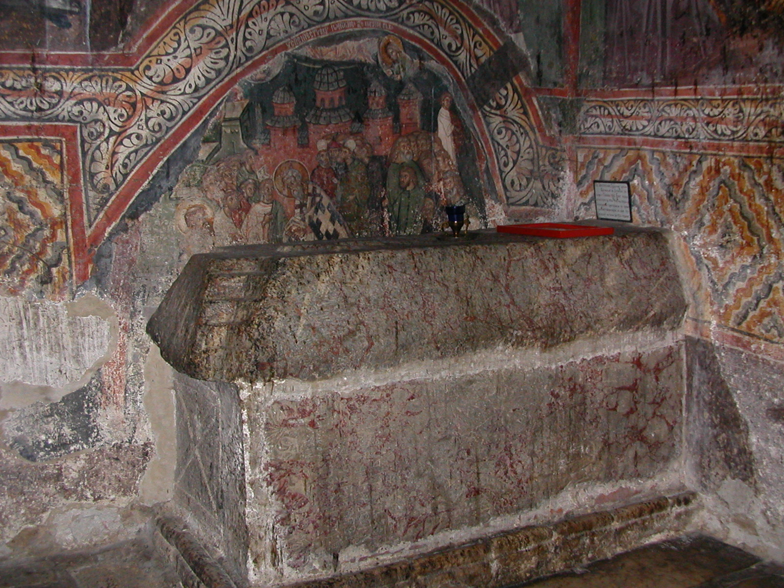 Unutrašnjost Crkve sv. Nikola i Bogorodične crkve - Pećka patrijaršija, autor Nikostrat Saronski